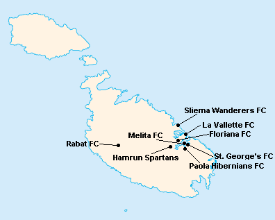 Répartition des clubs en First Division Maltaise 1963-1964.